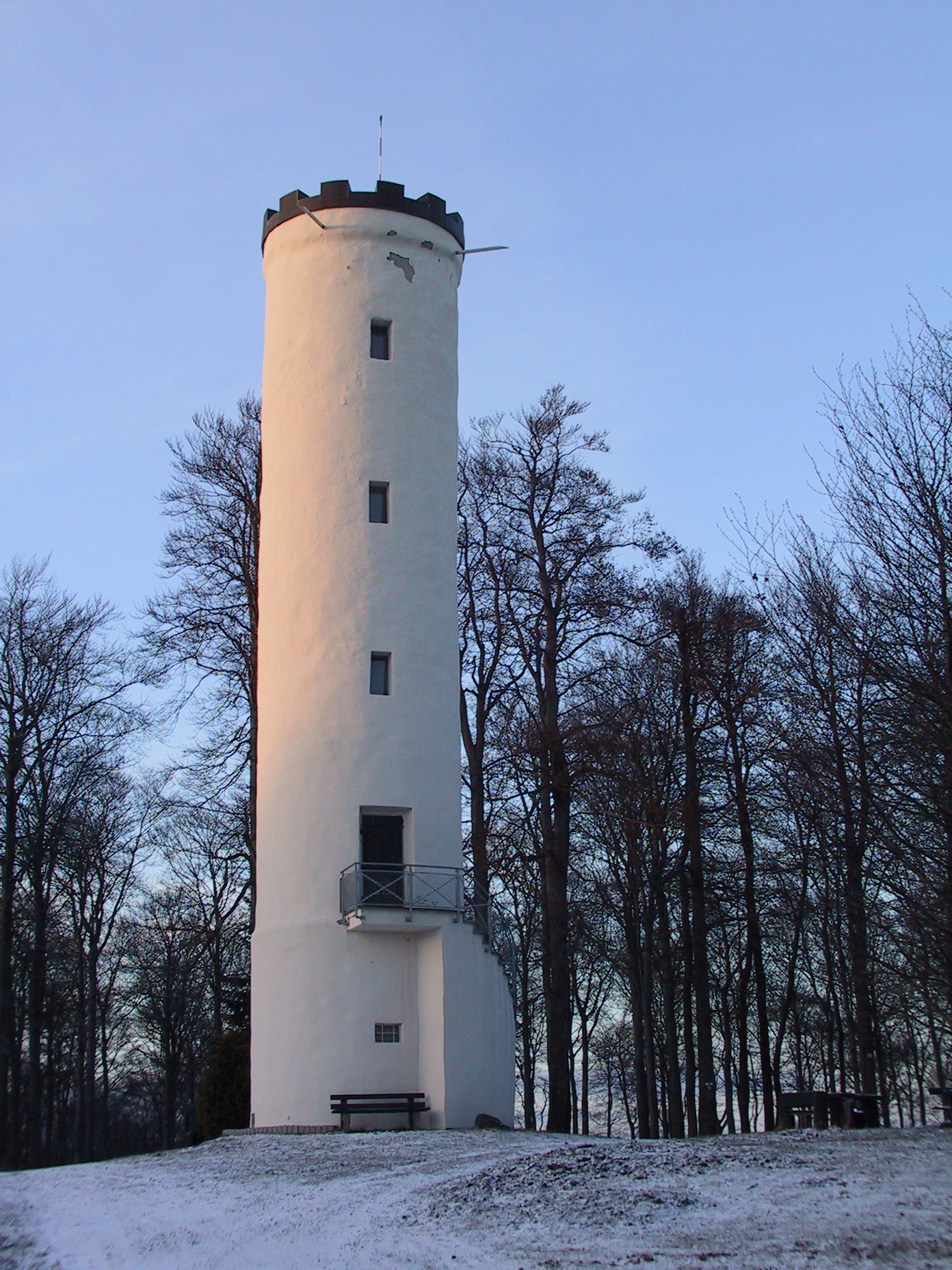 Kaiser Wilhelm Turm, Sackpfeife, Biedenkopf